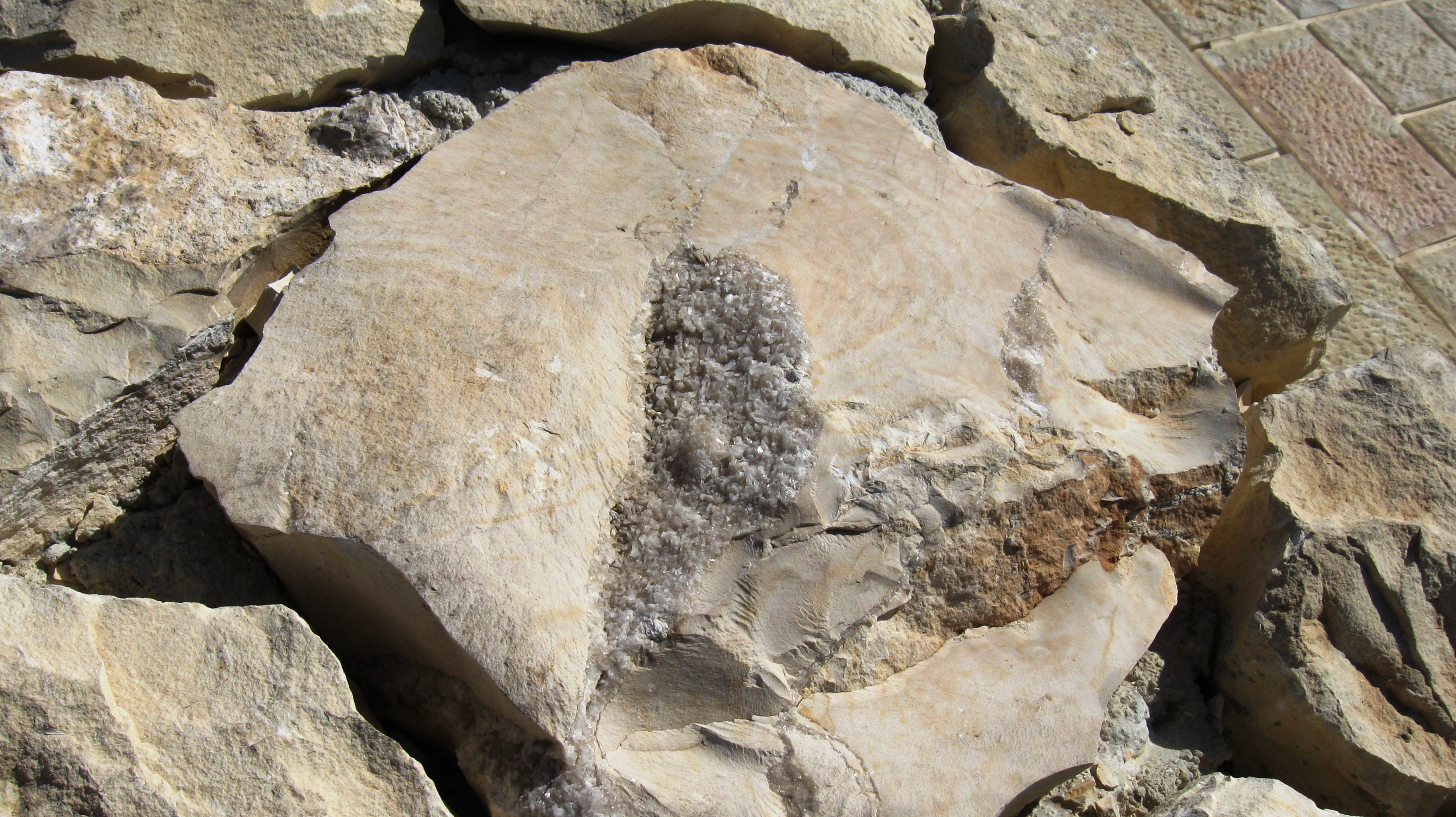 קחציט באבן גיר - צולם מגדר במוזיאון ישראל רישיון נוצר על ידי משתמש:Daniel Ventura